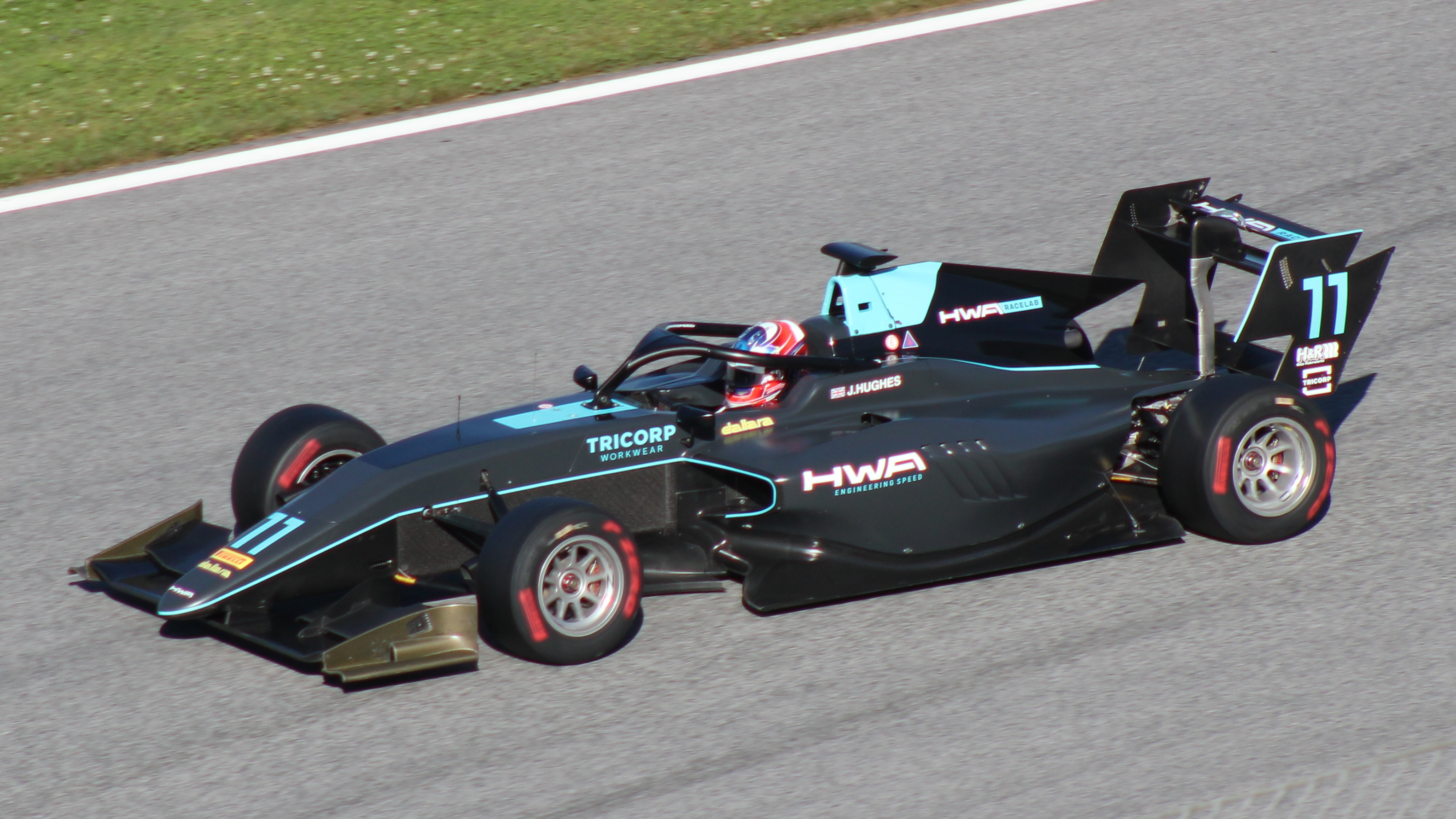 Hughes beim Rennwochenende in Österreich 2019